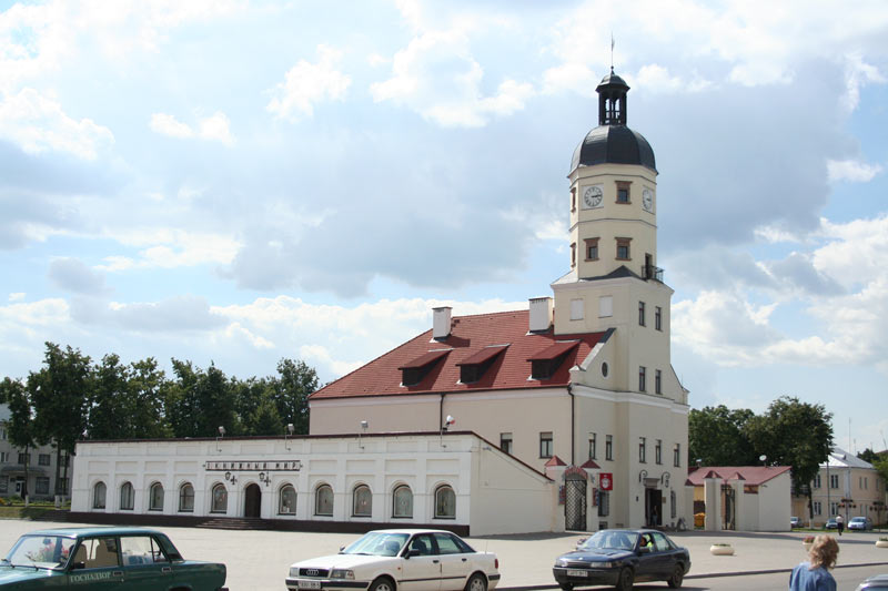 Нясвіжская ратуша